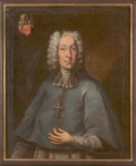 Franz Anton von Harrach (1665-1727), Bischof von Wien und Fürsterzbischof von Salzburg